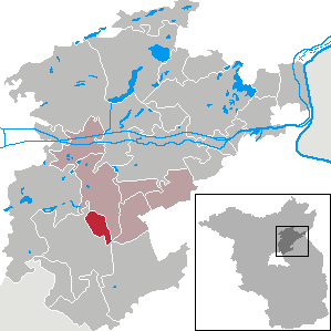 Rüdnitz in Brandenburg (Country) - District Barnim